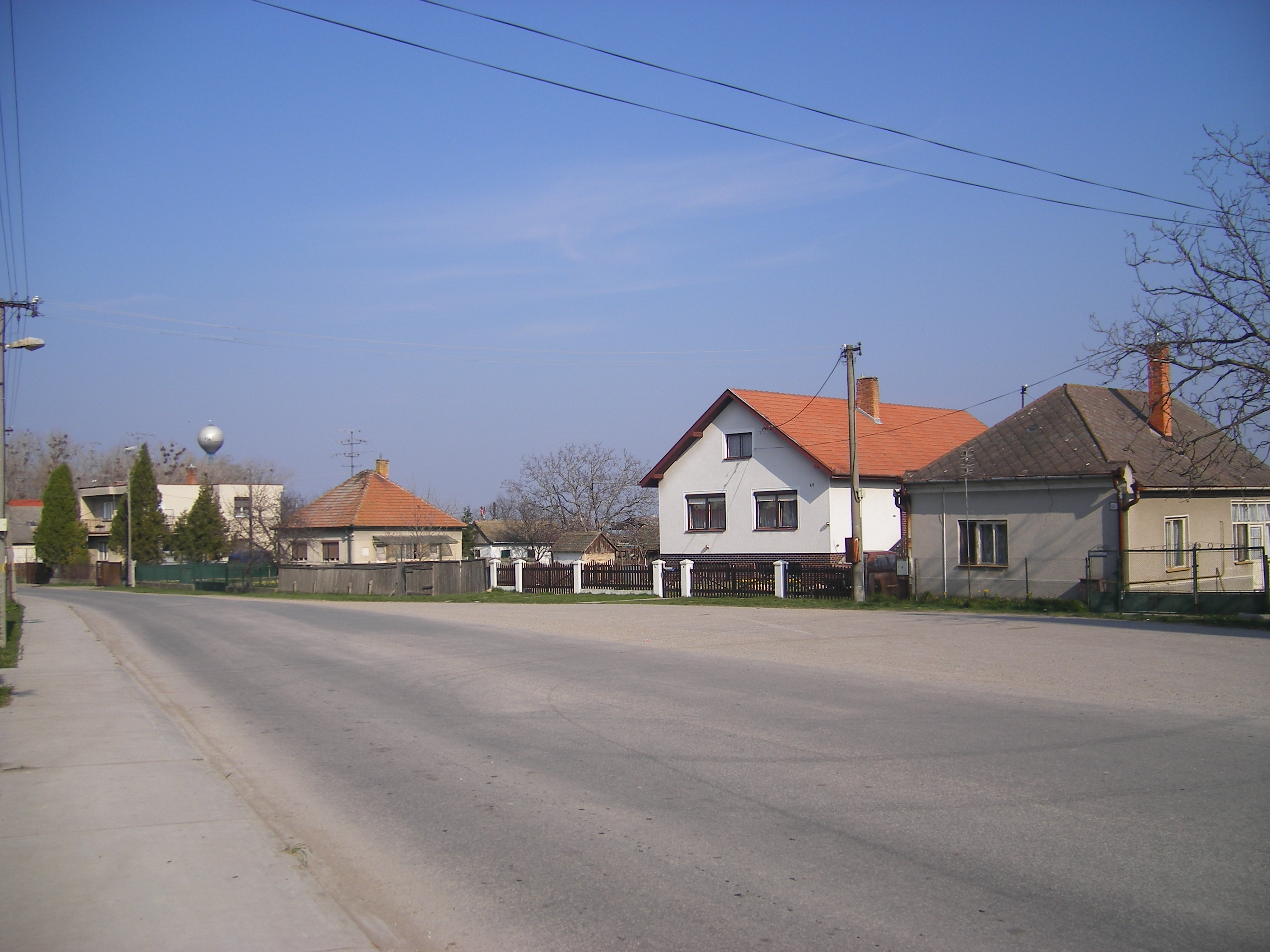 Lakszakállas - utcakép